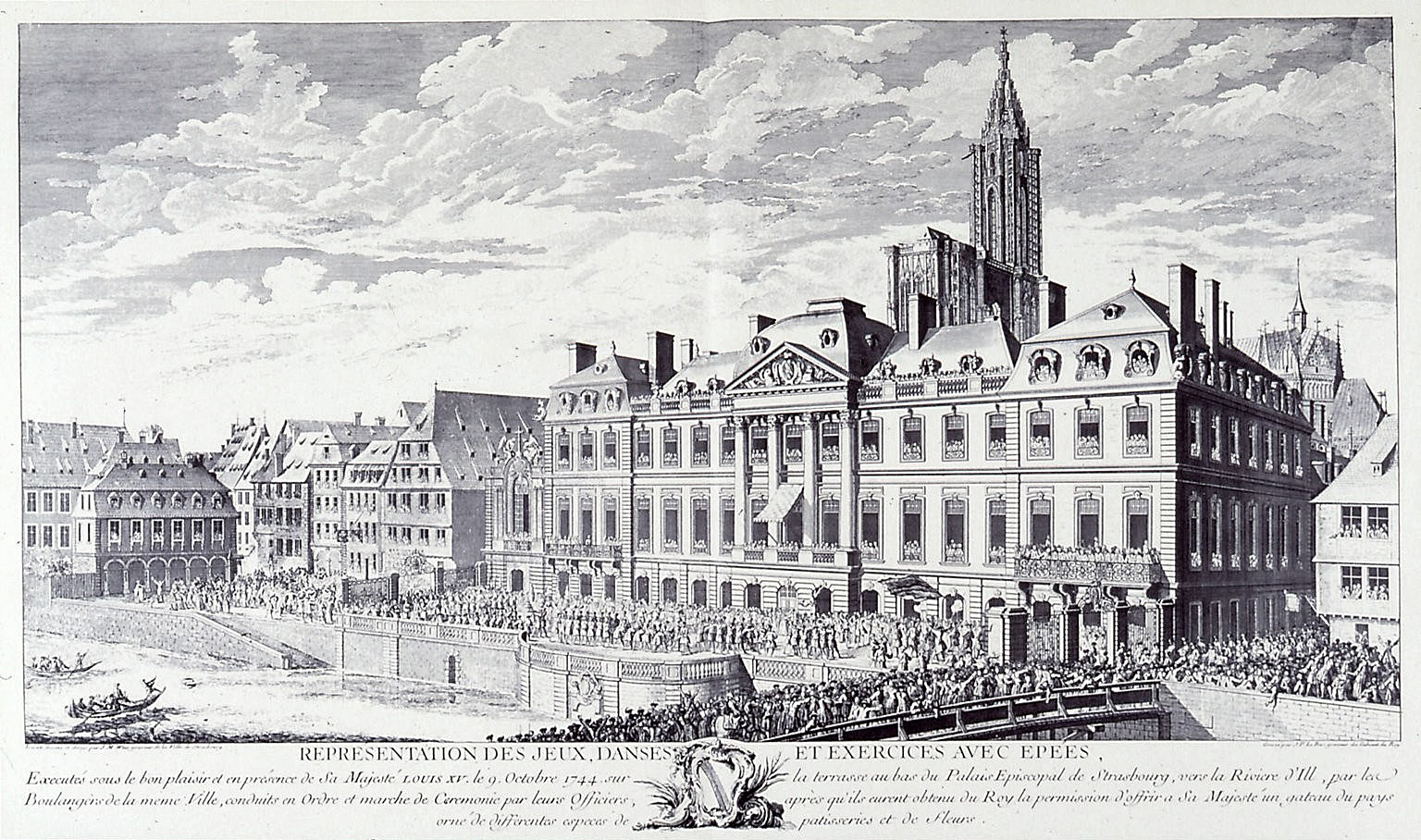 Représentation des jeux, danses et exercices avec épées, exécutées par les boulangers. Bibliothèque nationale et universitaire de Strasbourg